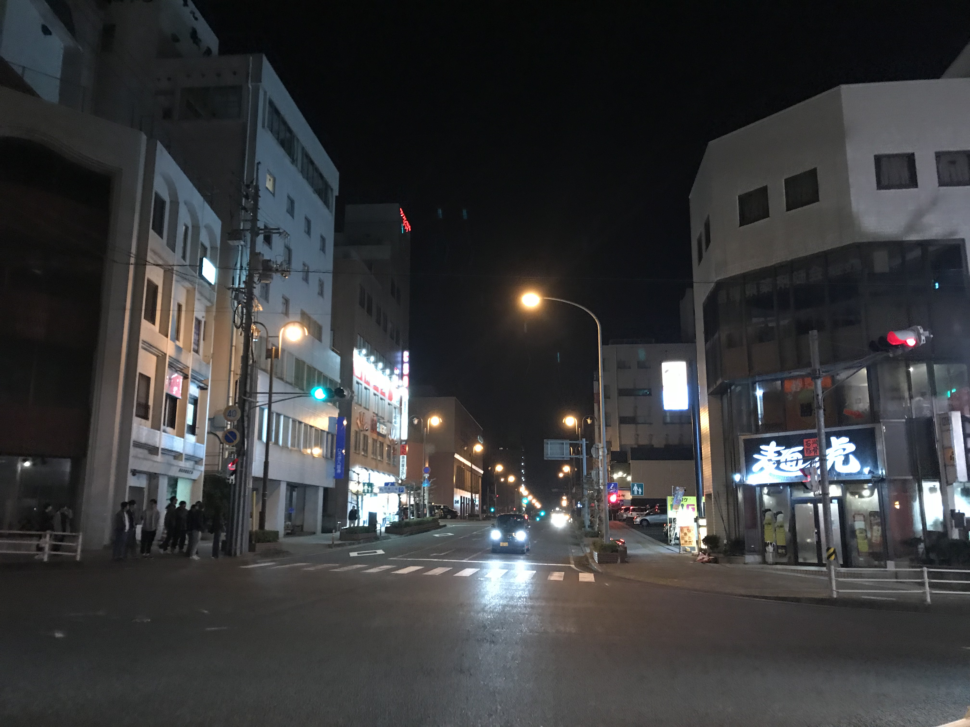 浜田駅付近の夜景